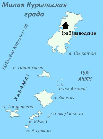 Карта Малой Курыльскай грады